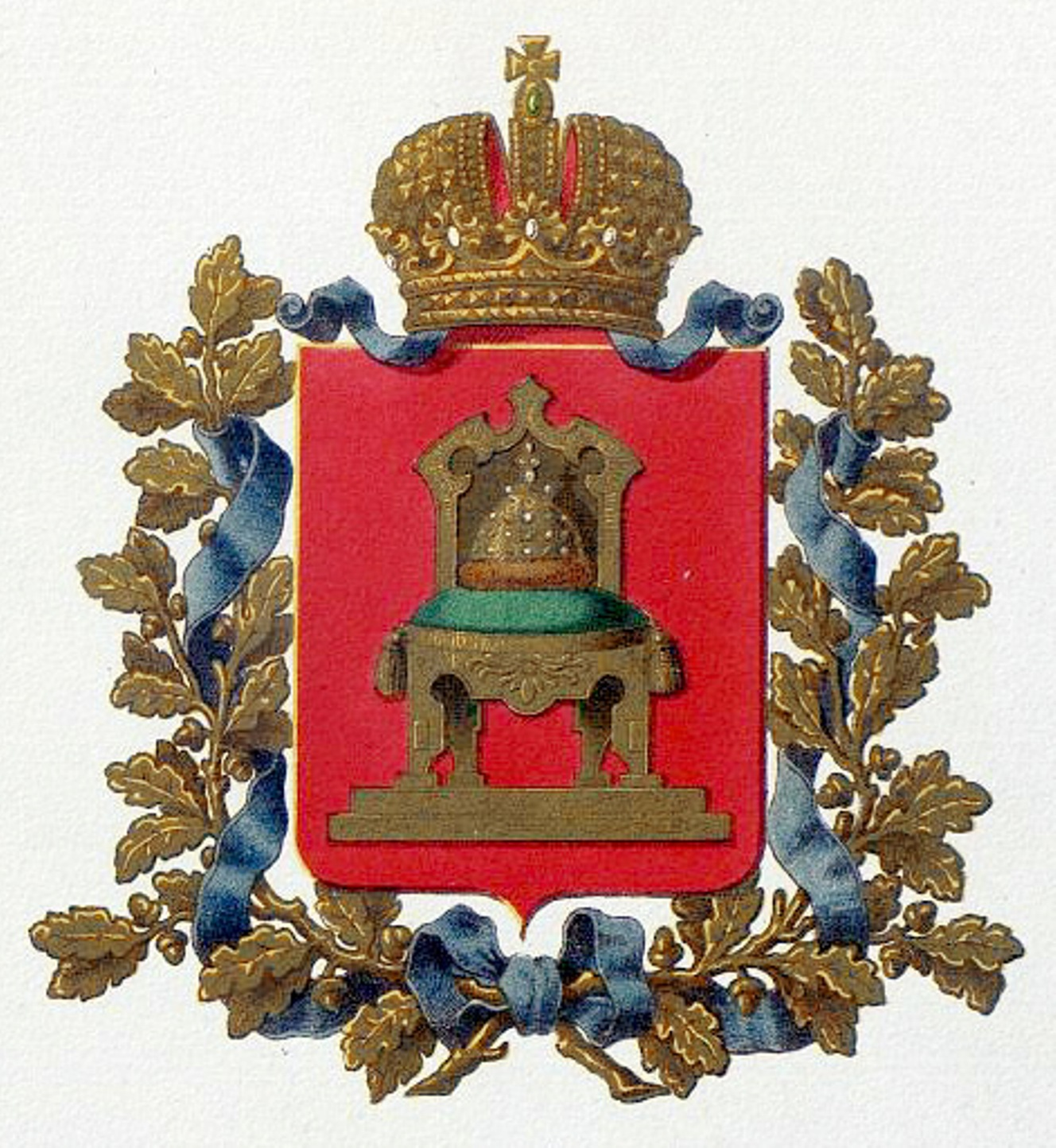 Official Russian Empire coat of arms Tver Governorate. Герб Российской Империи Тверской губернии в Гербовнике МВД. Утверждён Императором Всероссийским Александром Вторым.